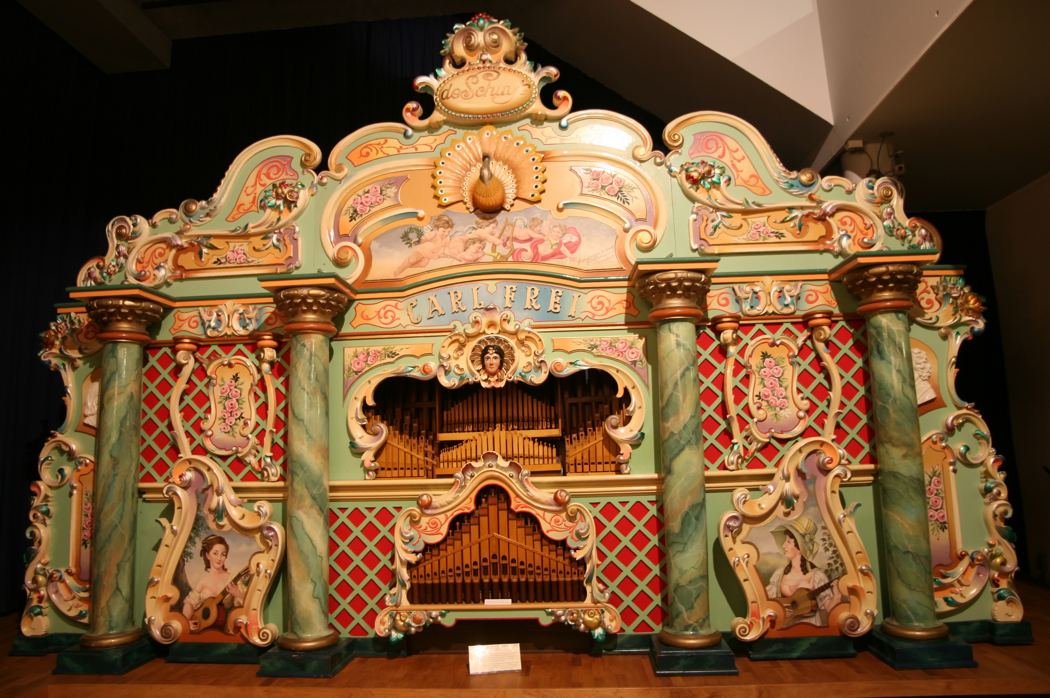 museum speelklok tot pierement (229)